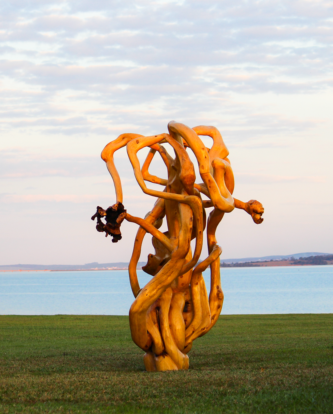 Escultura "Bailarina da Natureza" Madeira de floresta de manejo 270 x 190 x 170 cm